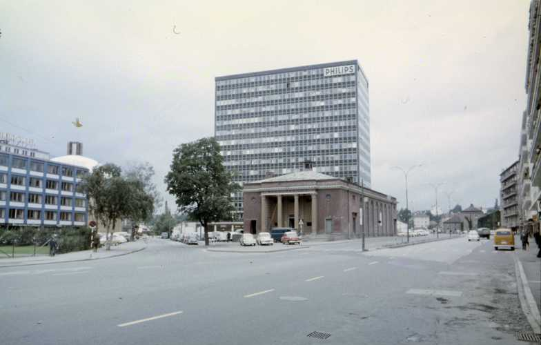 Kinopaleet på Majorstuen kort tid før det ble revet i 1964. I bakgrunnen det da nyoppførte Philipsbygget. Kinopaleet ble oppført i 1924 og var tegnet av Lorentz Harboe Ree og Carl Buch.